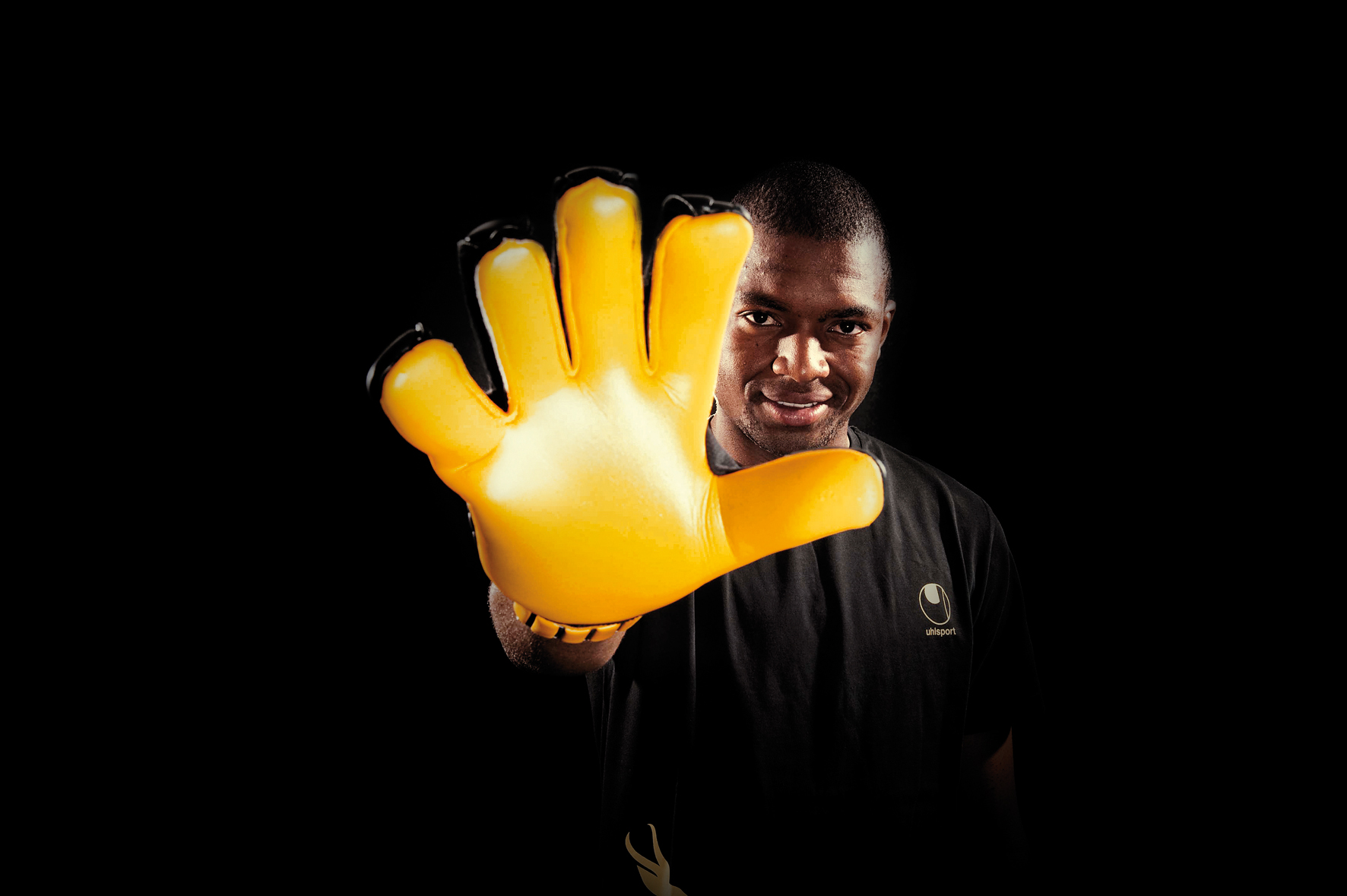 Khune